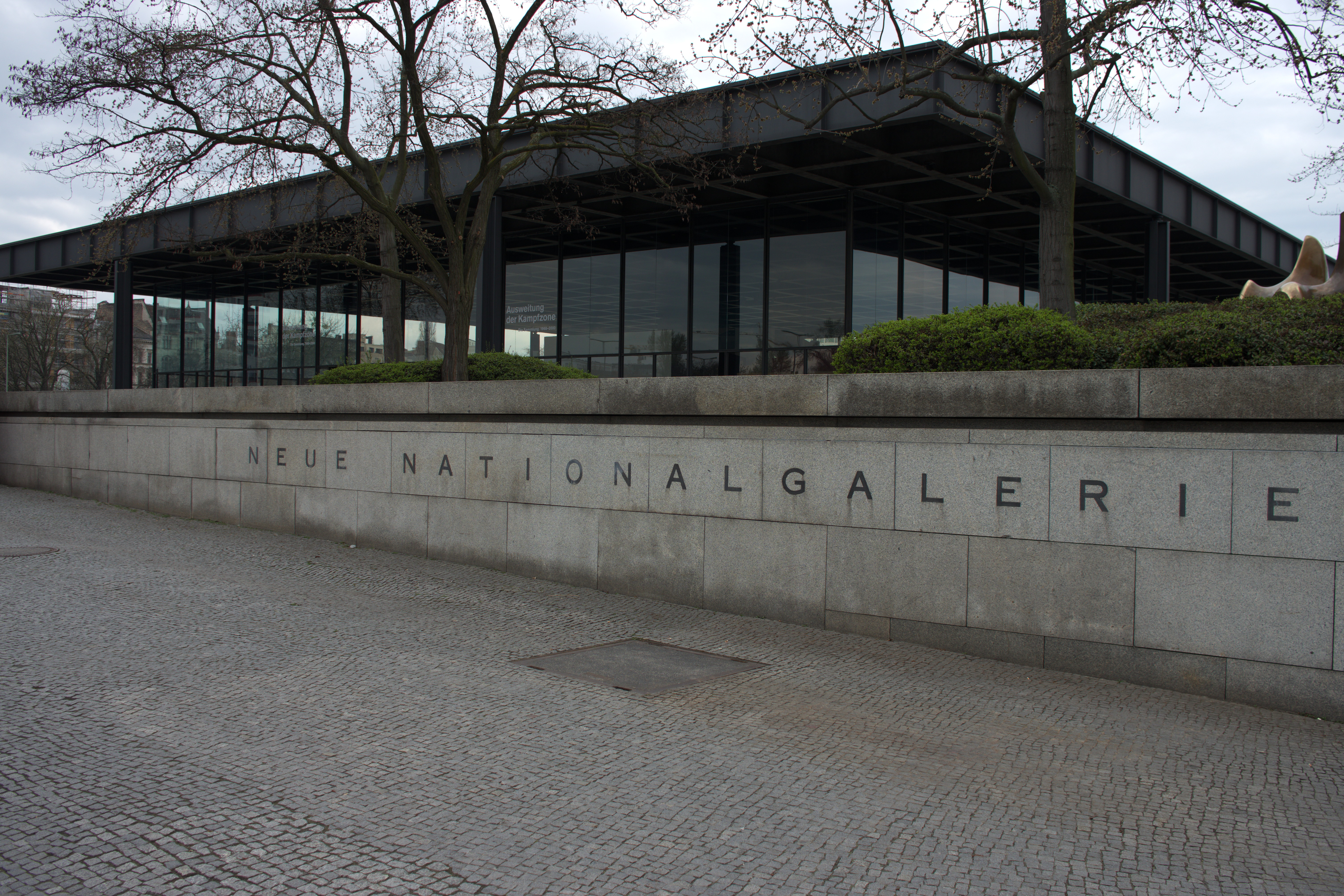 Berlin, Neue Nationalgalerie